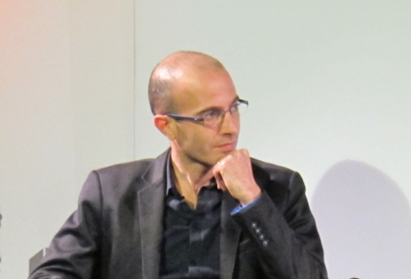 Yuval Noah Harari at an interview in Berlin, presenting the German translation of "Homo Deus".